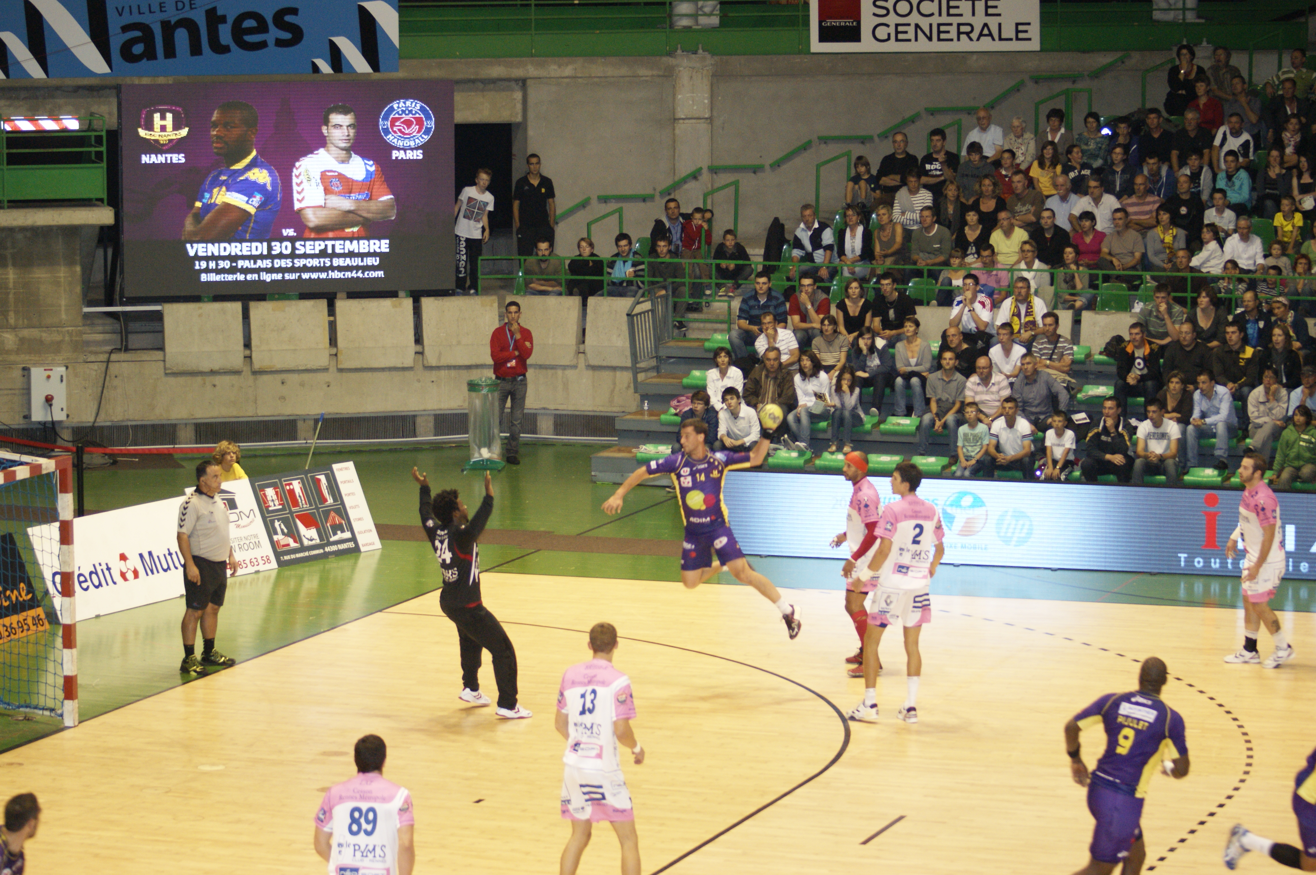 Frédéric Dole face à Rémy Gervelas